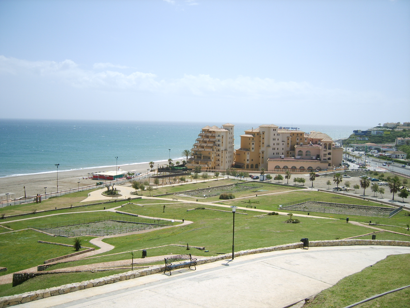 Fuengirola beach